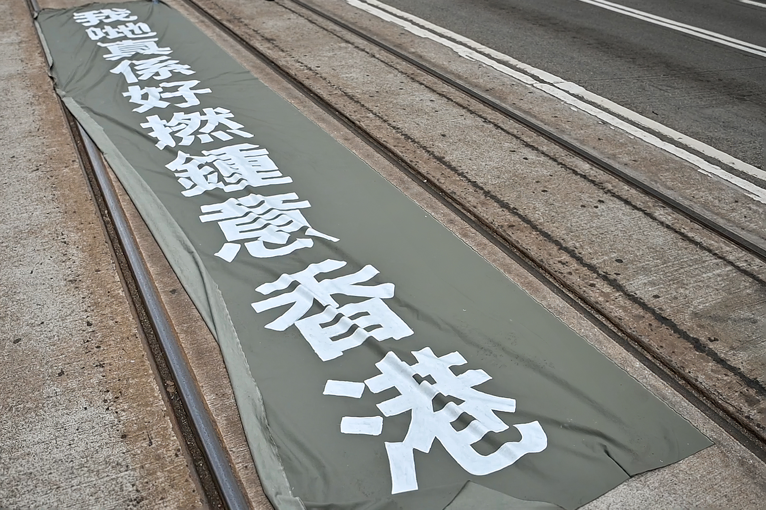 banner